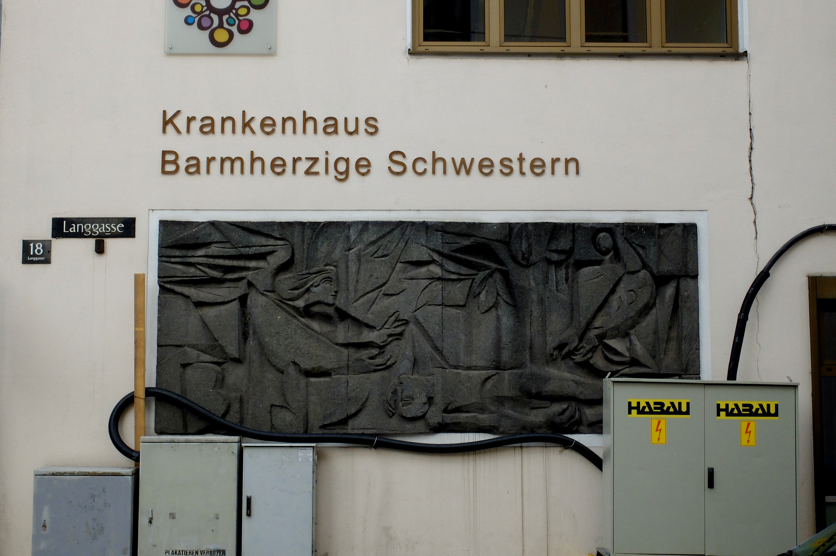 Linz 2014